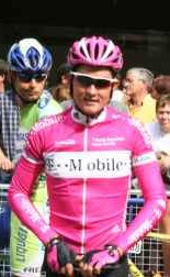 Ciclista